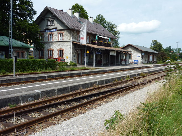 Bahnhof Pfronten-Ried